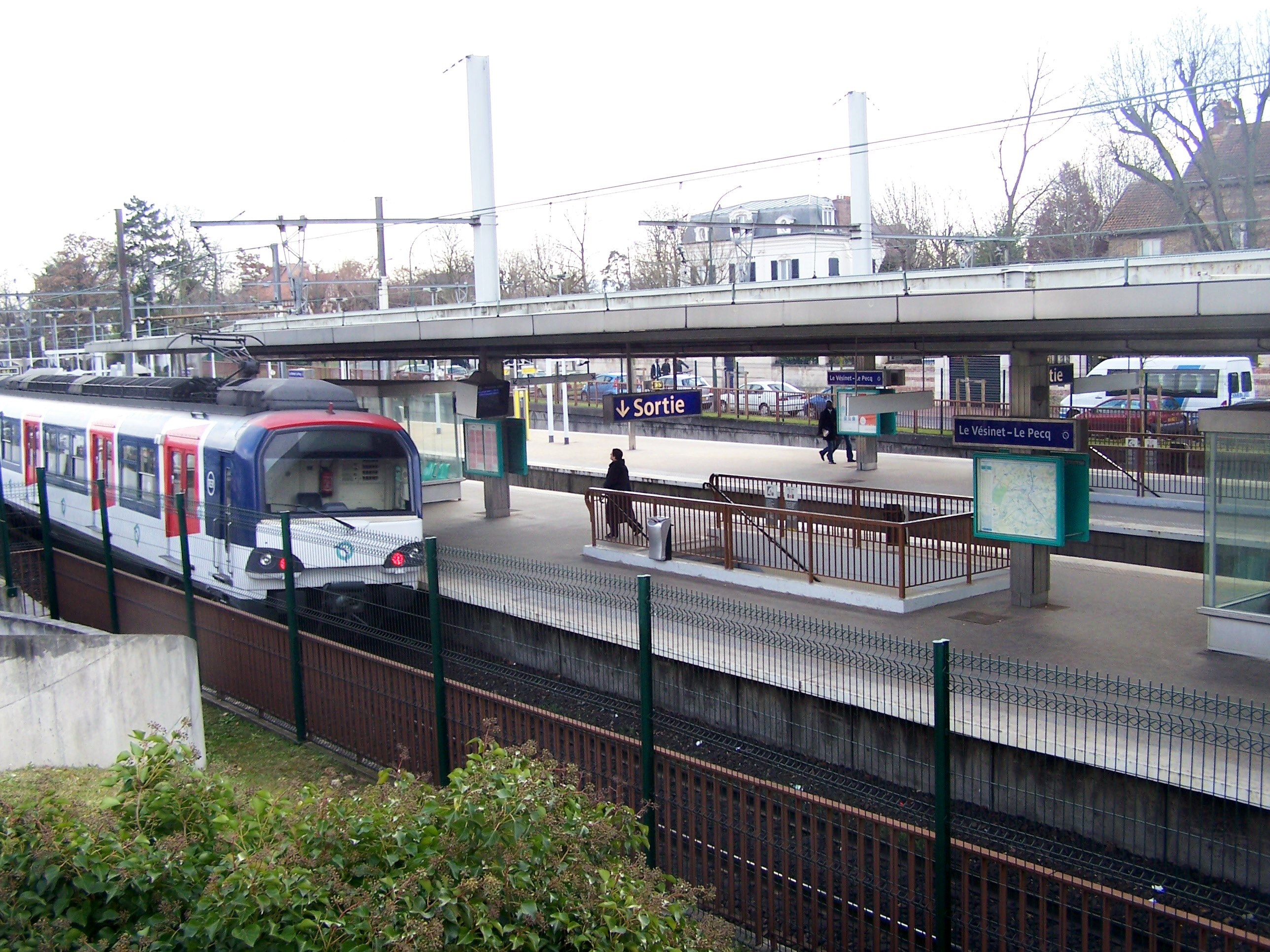 Gare du Vésinet - Le Pecq au Vésinet, Yvelines, France